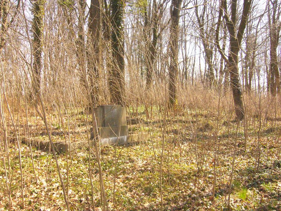 Stary cemntarz w Salinie